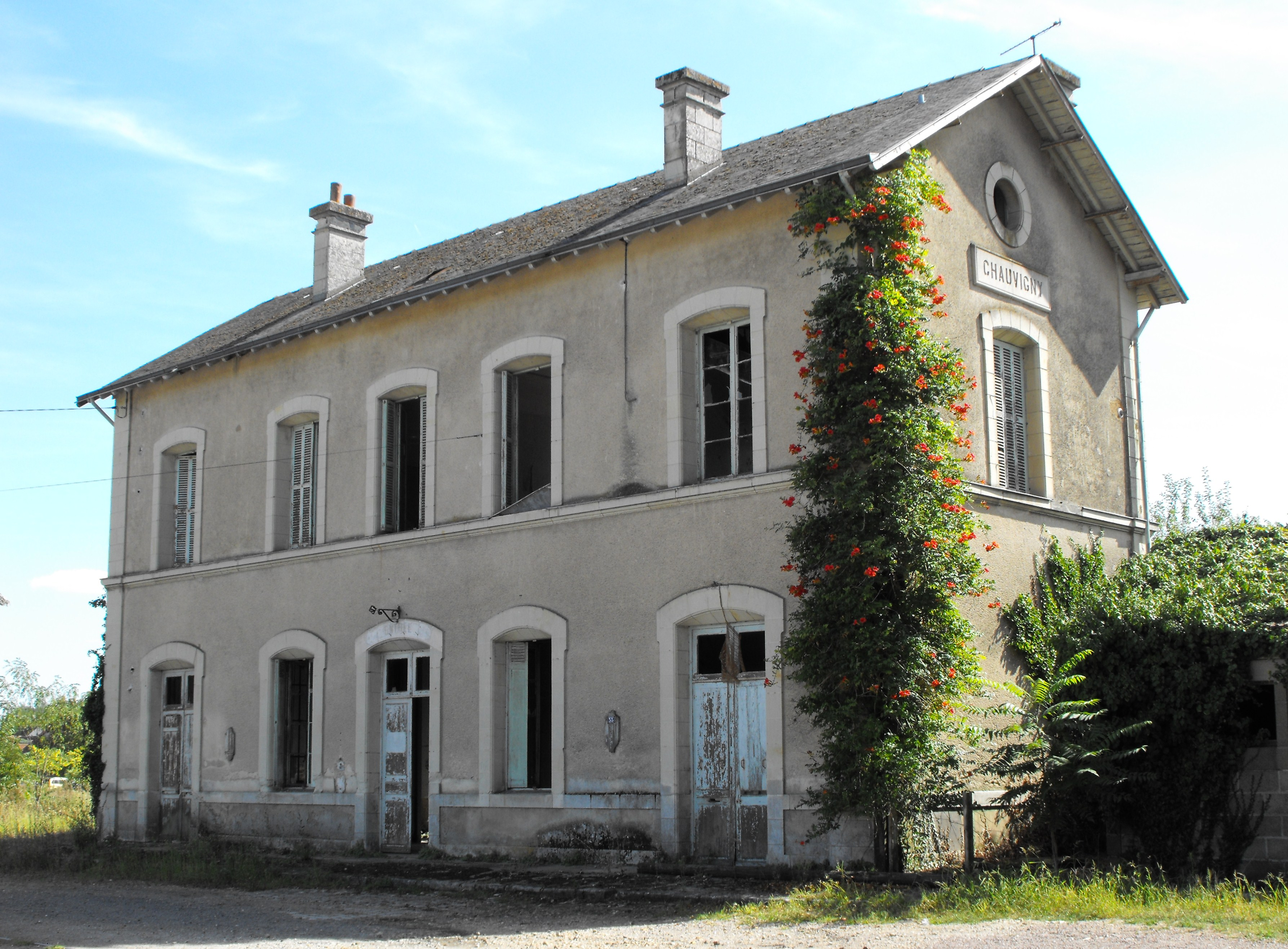 La gare de Chauvigny